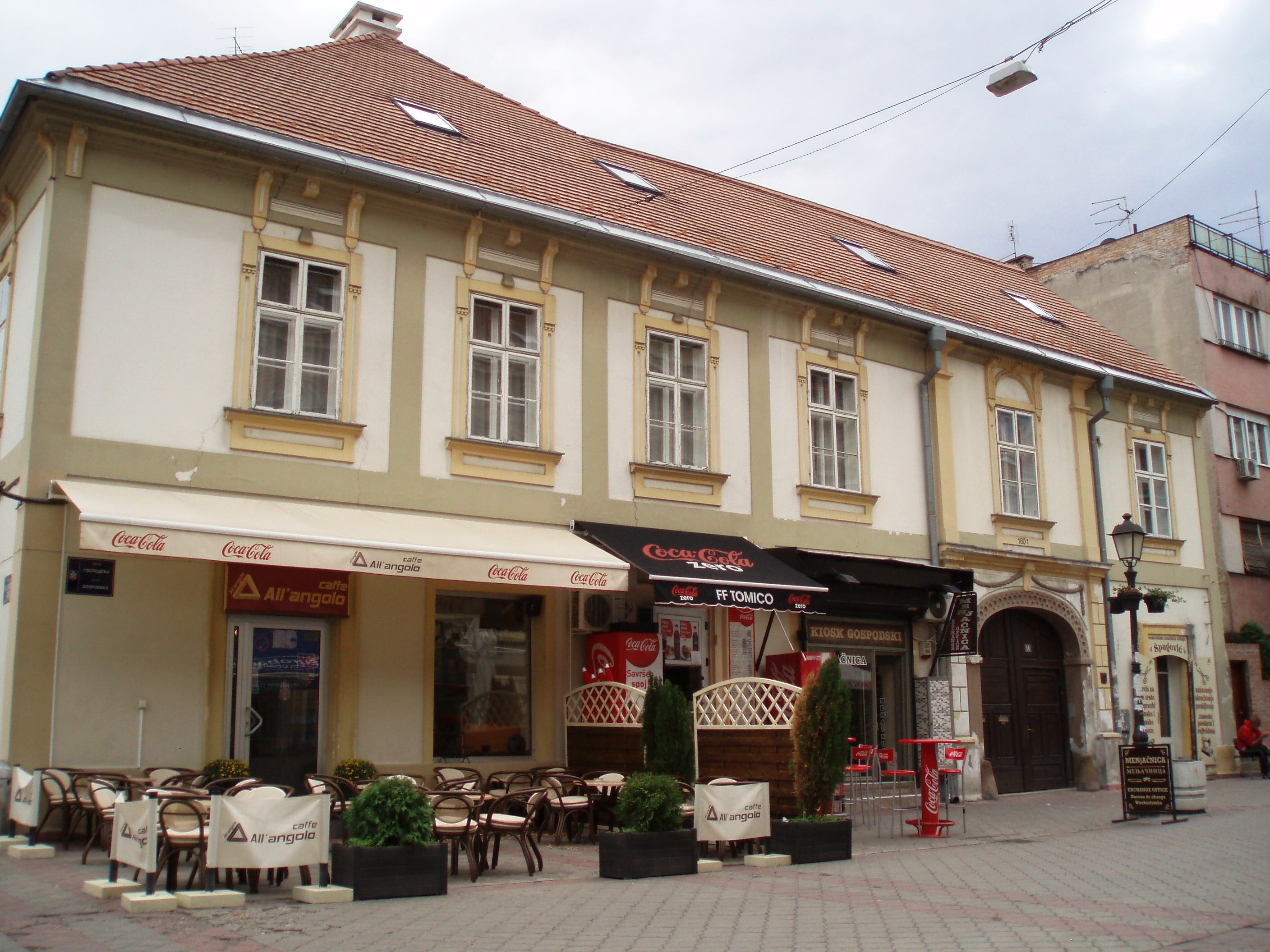 Kuća Markovića izgled iz Gospodske ulica, sagrađena 1801. godine, Autor fotografije:Nicolo